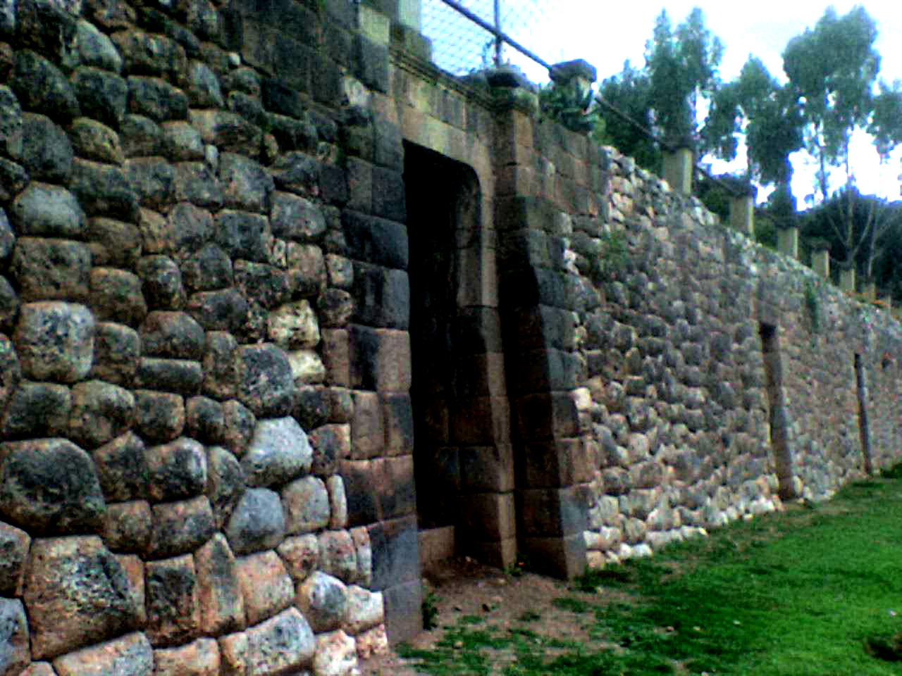 Muros de Colcapata, antiguo palacio de Manco Cápac.